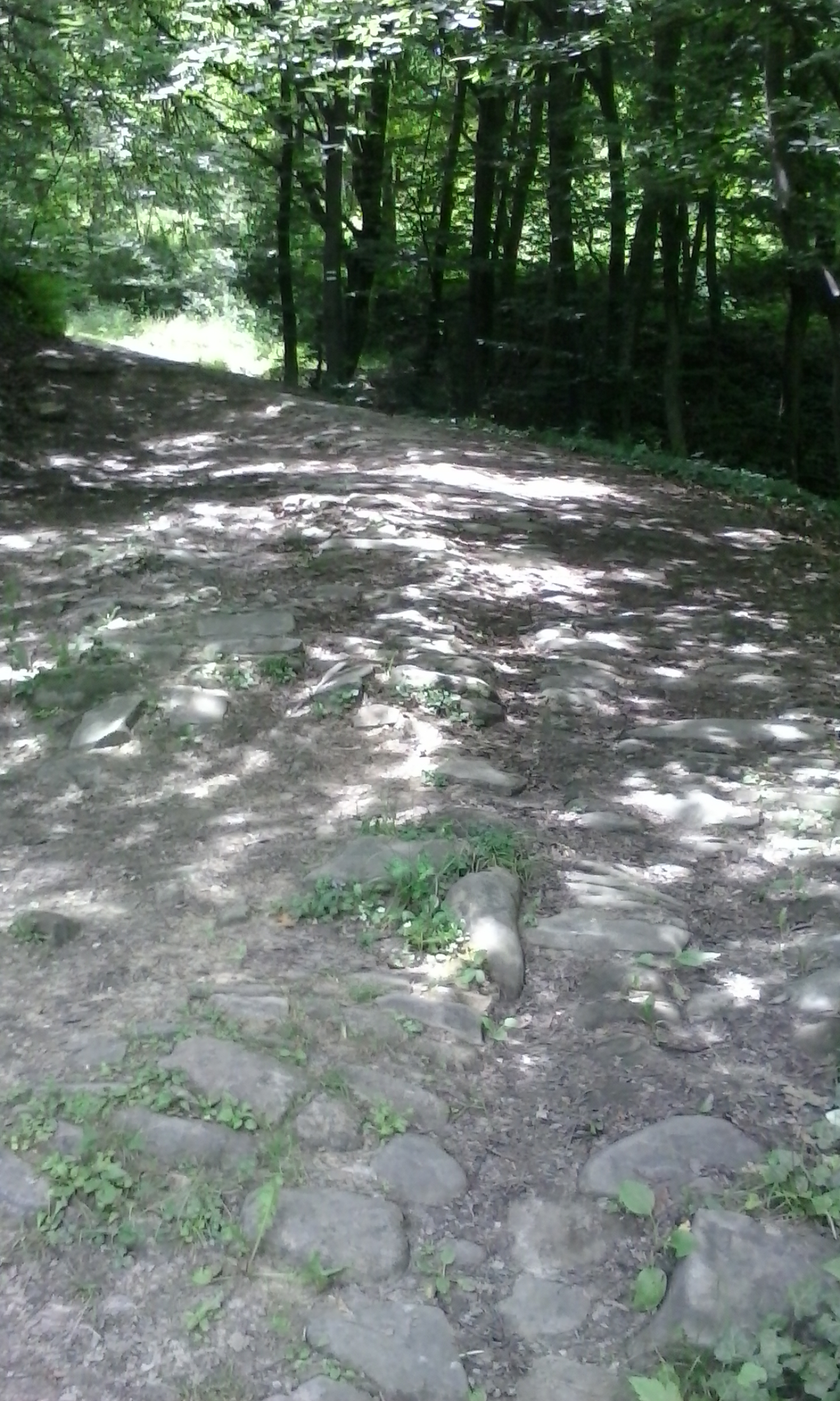 Веленци - римския калдаръмен път към Боженци